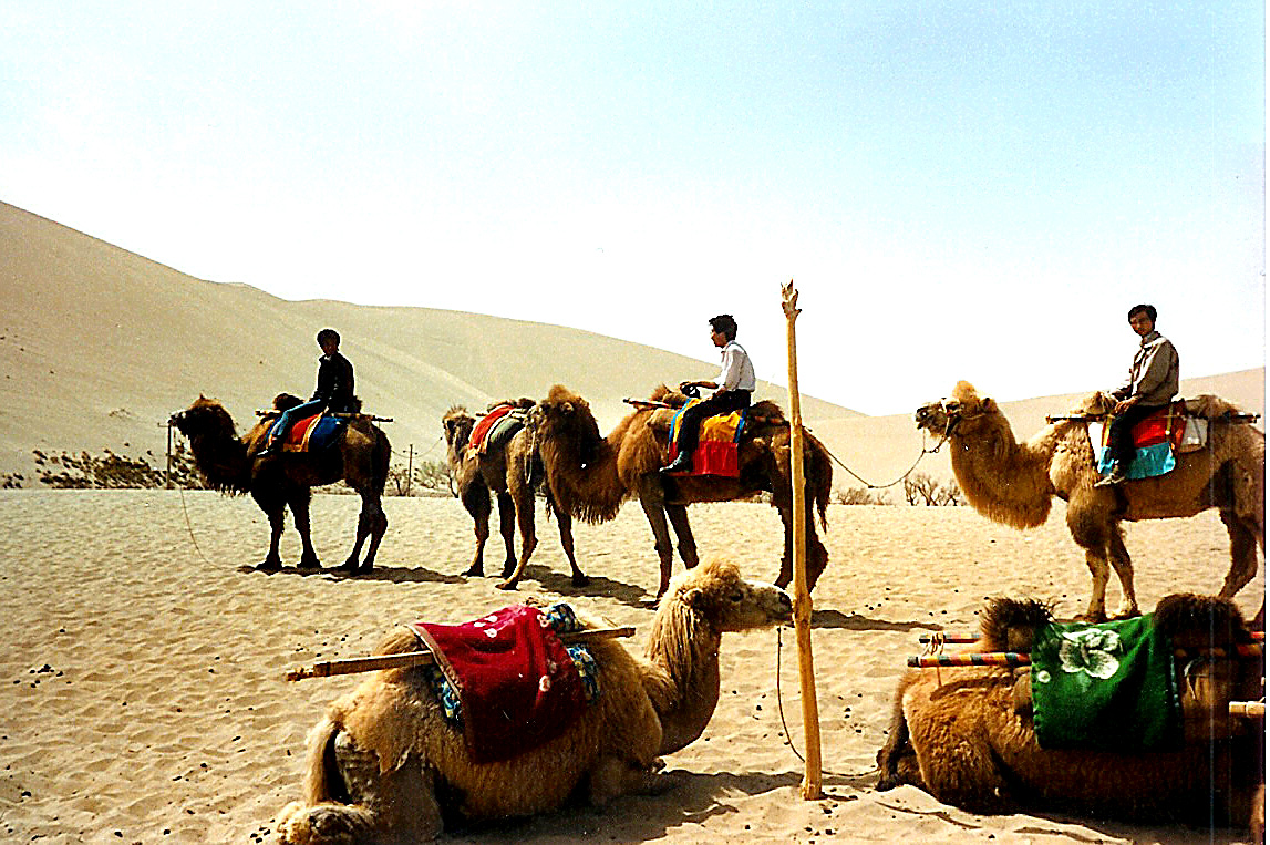 An der Wüst bei Dunhuang.